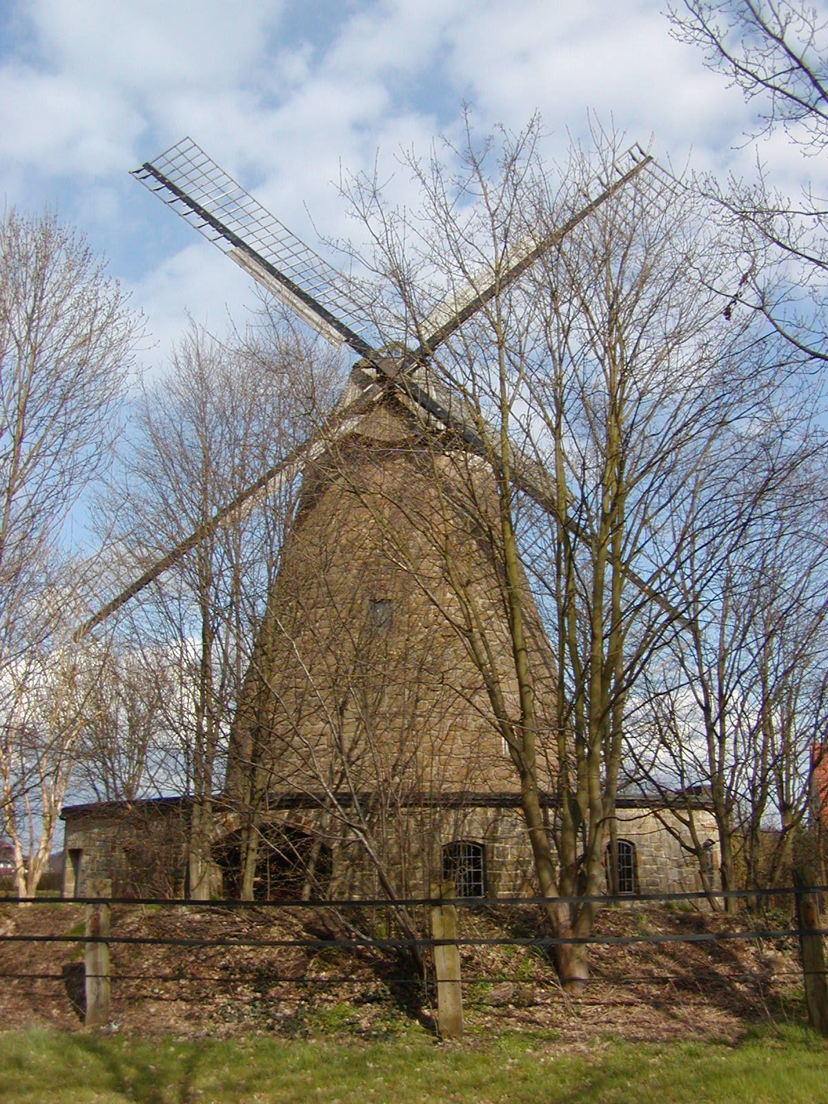 Windmühle Hartum Sonstiges: ...